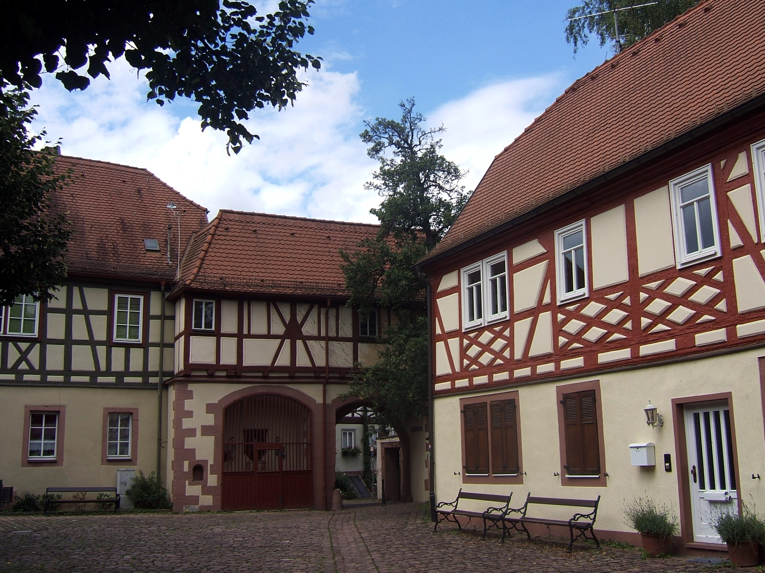 St.-Michaels-Kirchhof in Lohr mit dem Friedhofstor.